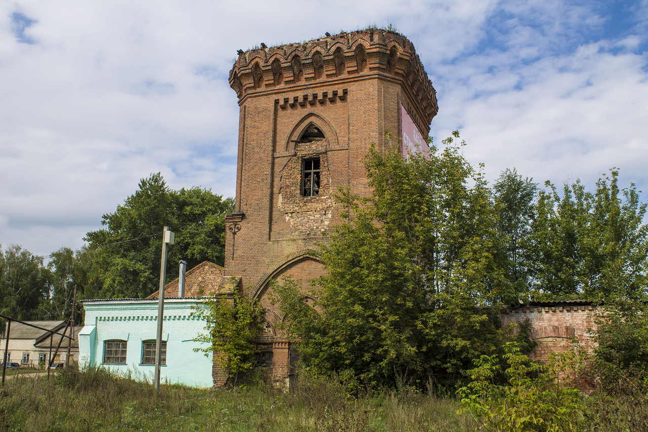 Водонапорная башня над артезианской скважиной. 1907 год постройки. Село Рождествено, Самарская область